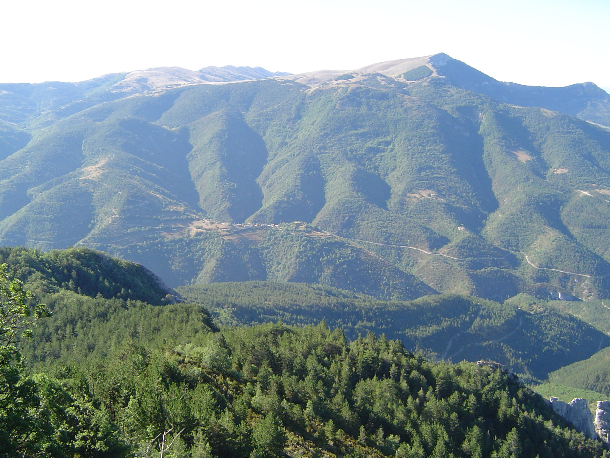 le village et une partie de la commune d'Aucelon vue de la Pale (rocher de la commune)